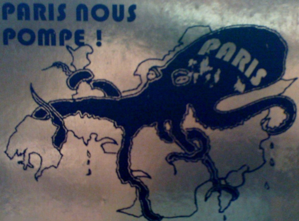 Affiche du Rassemblement du Peuple Franc-Comtois